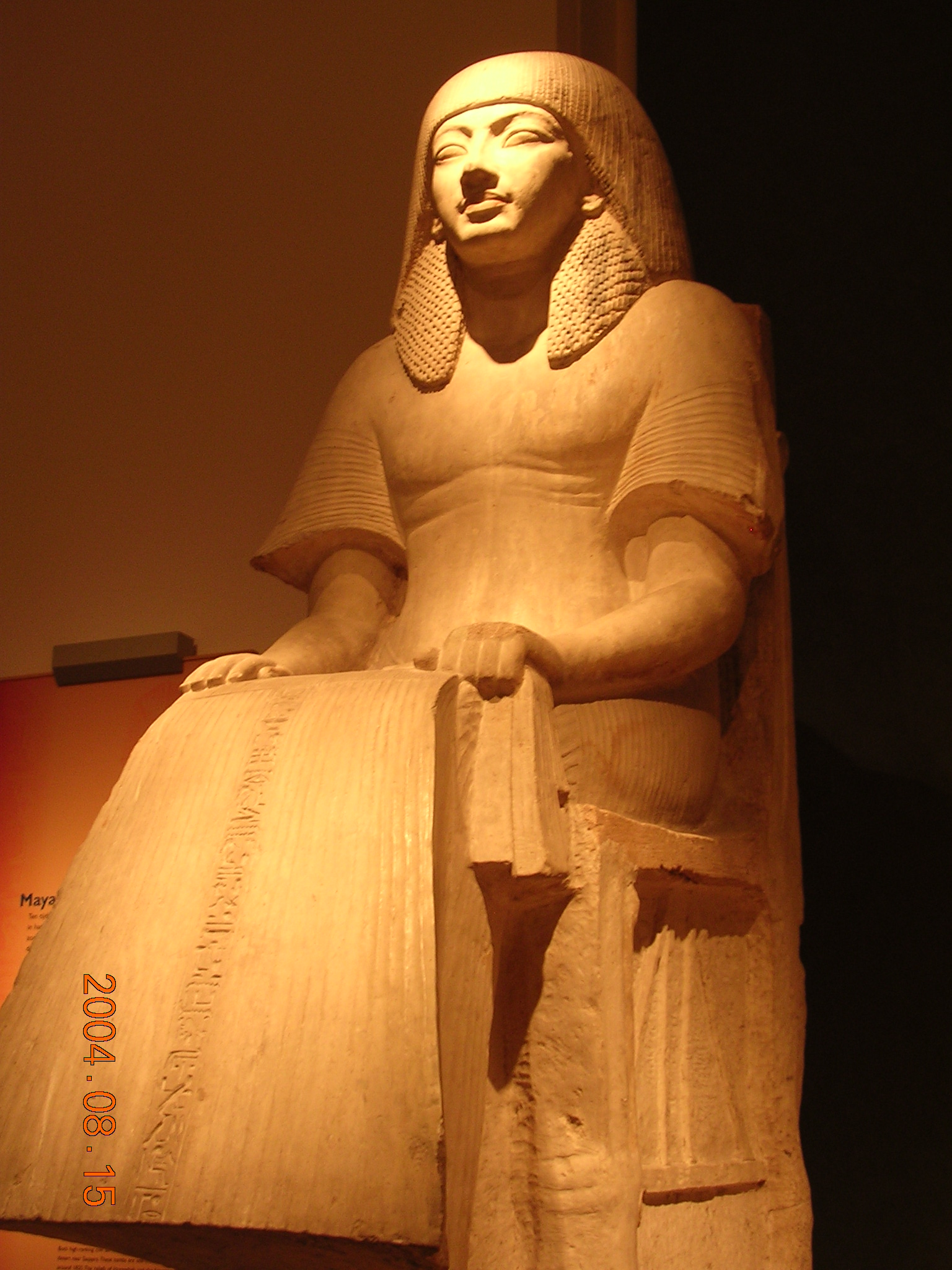 Maya szobra (Hollandia, Leiden, Rijksmuseum van Oudheden)